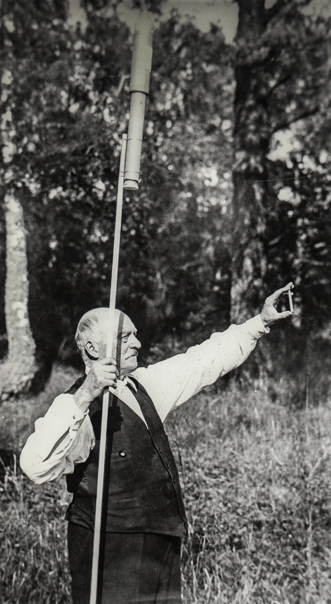 Törners Fyrverkerilaboratorium, Finedal, Lidingö. Jean Törner med raket. Skannat dåligt reprofoto av gamla foto. BYTES UT !